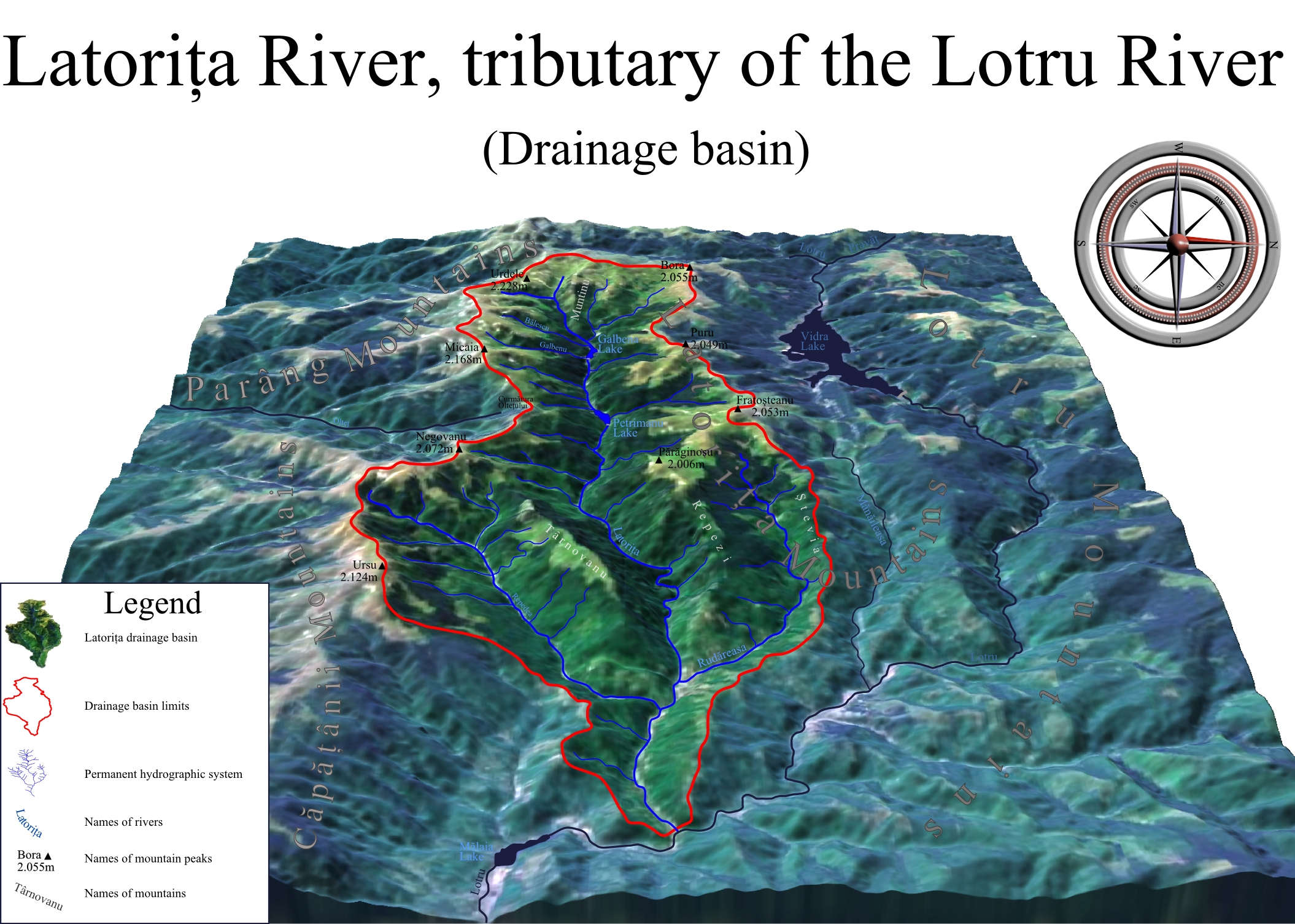 Bazinul hidrografic al Râului Latorița, Romania. Selectați alte bazine hidrografice adiacente ale Defileului Oltului, menționate pe hartă în mod senzitiv cu chenare de note informative.